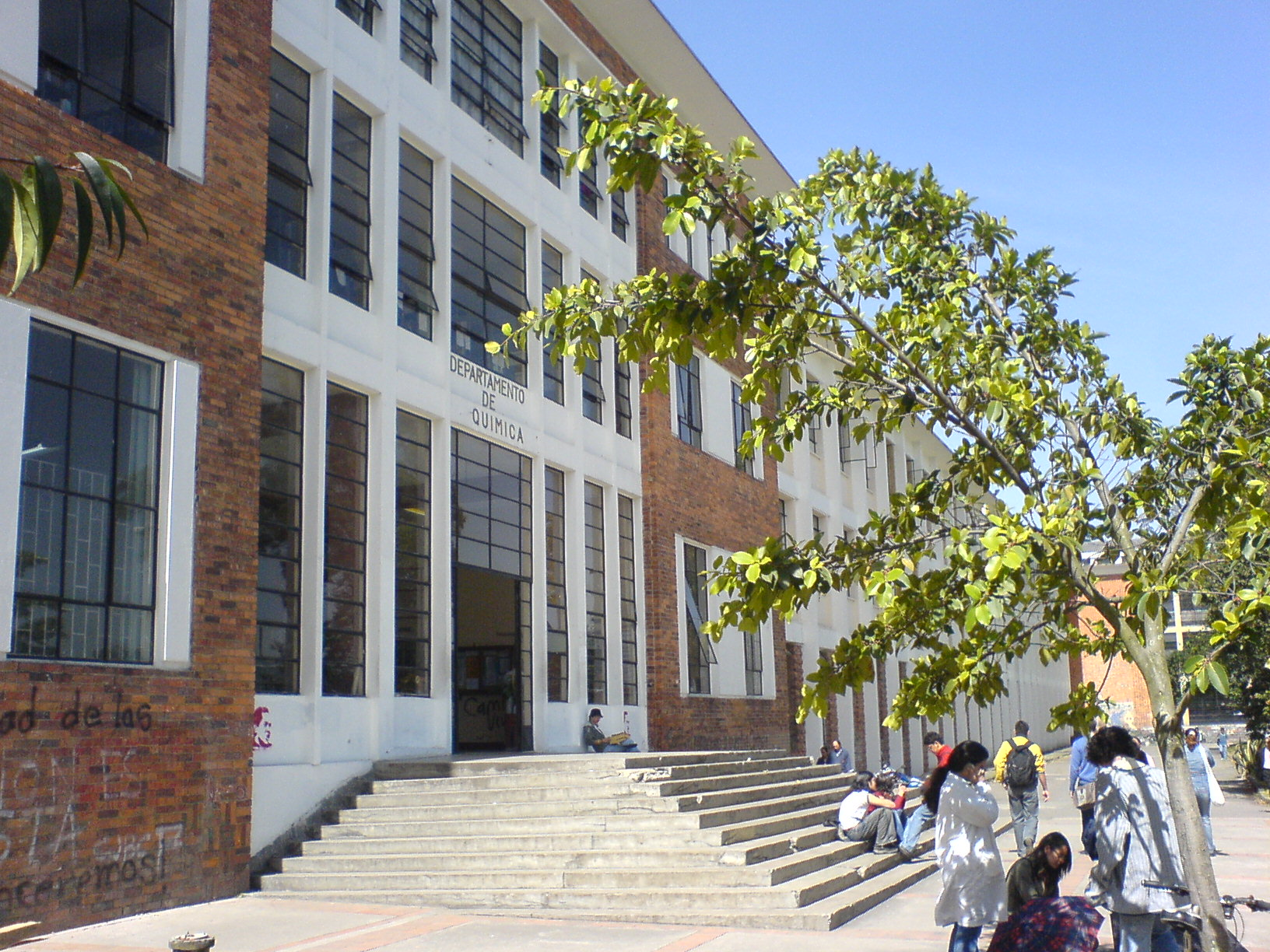 Departamento de Química, UNAL Chemistry Department